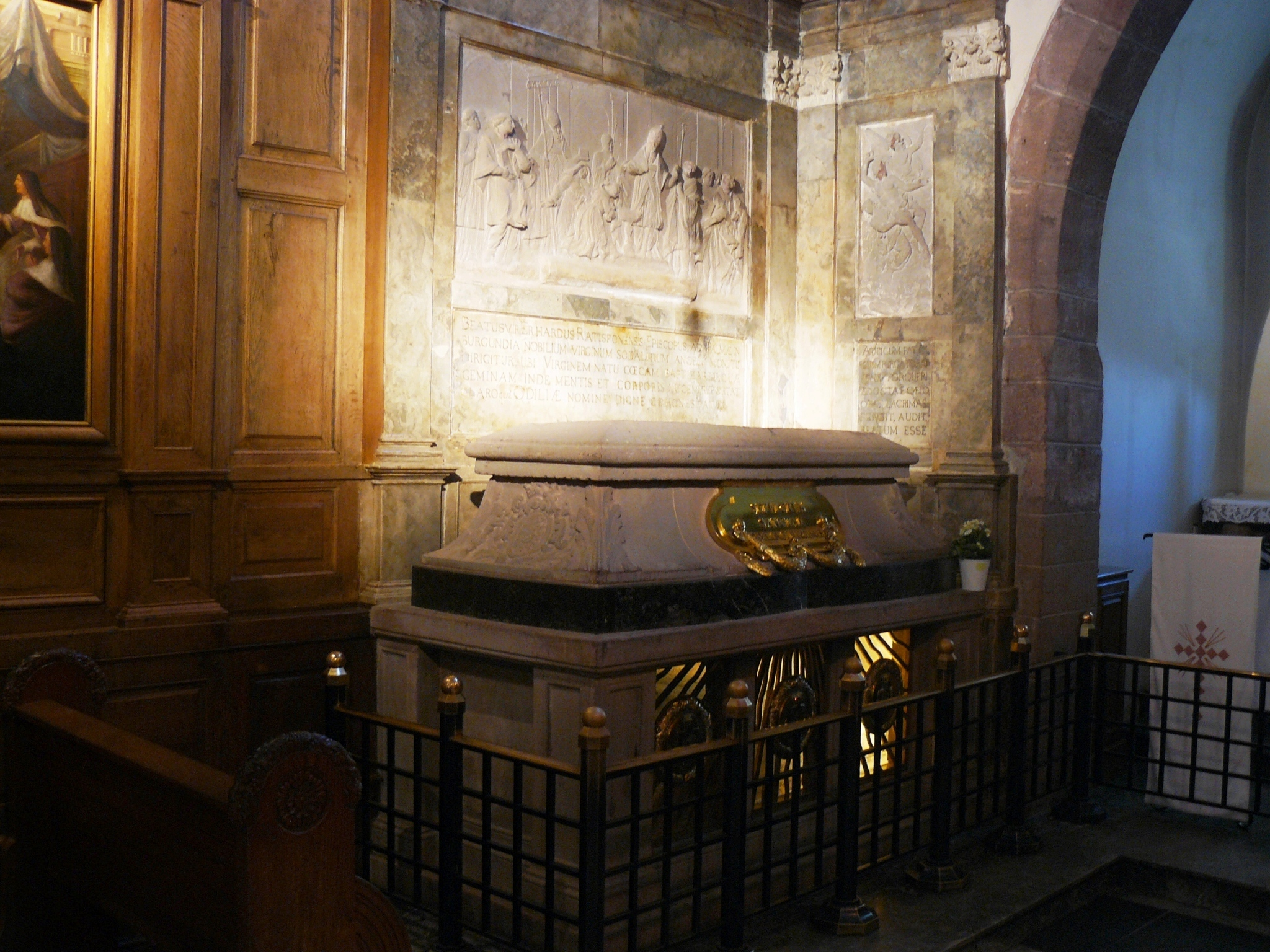 Tombeau de Sainte Odile, Fragments de bas-relief "Vie de Ste Odile" (1696)